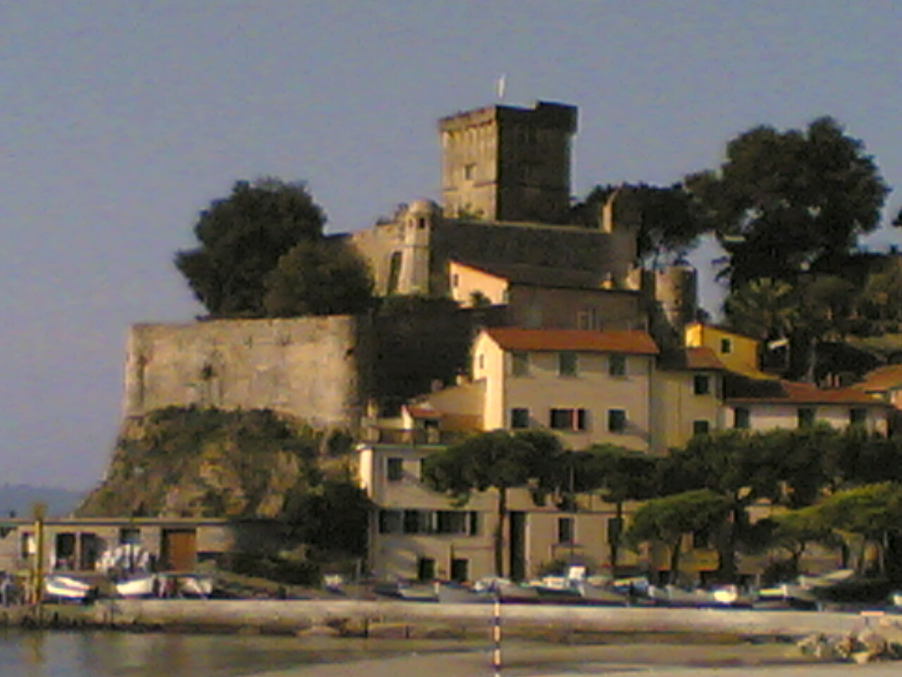 Immagine del Castello di San Terenzo